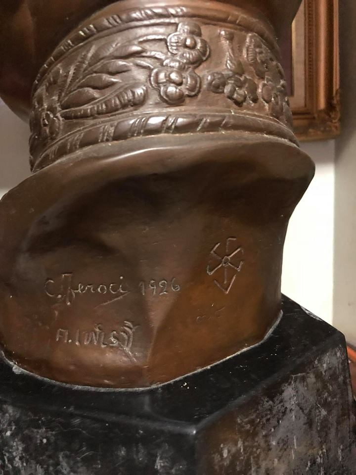 พระบรมรูปปั้นหล่อโลหะ พระบาทสมเด็จพระมงกุฎเกล้าเจ้าอยู่หัว ที่ประดิษฐานอยู่ในห้องลูกเสือกองร้อยพิเศษเพชรบงกช เป็นมิ่งขวัญให้ครูและลูกเสือมาช้านานทำไมถึงสง่างามเช่นนี้ สาเหตุเพราะองค์ล้นเกล้ารัชกาลที่6 เสด็จมาเป็นแบบด้วยพระองค์เอง